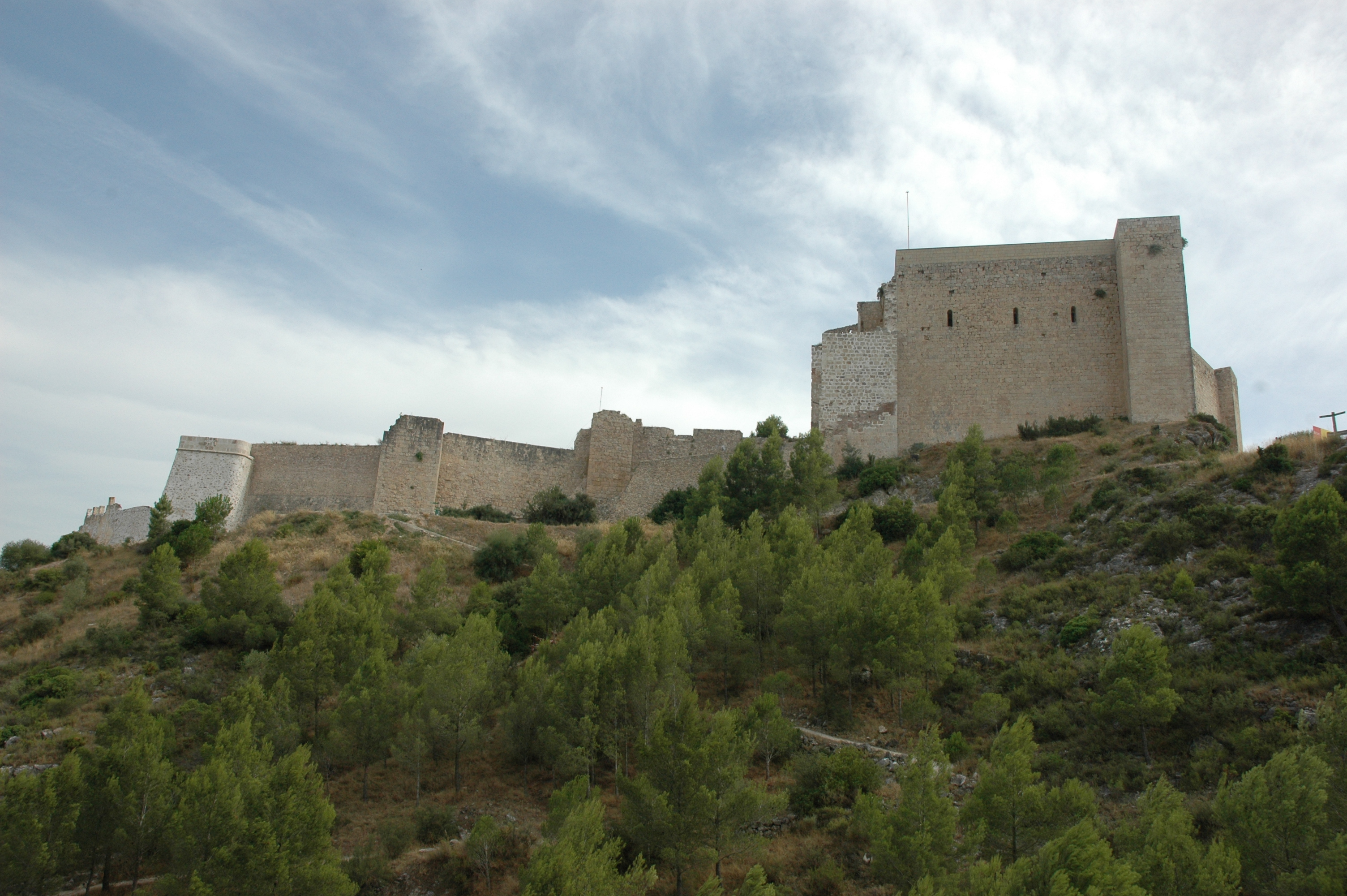 Castell de Miravet - General